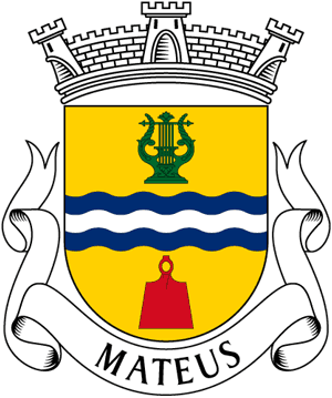 Brasão da freguesia de Mateus (concelho de Vila Real)